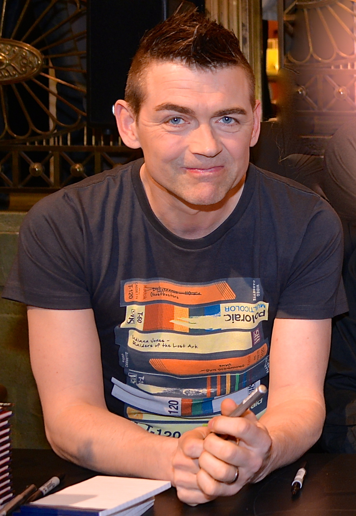 Gyllene Tider signerar sin senaste platta "Dags att tänka på refrängen" på NK i Stockholm den 26 april 2013.